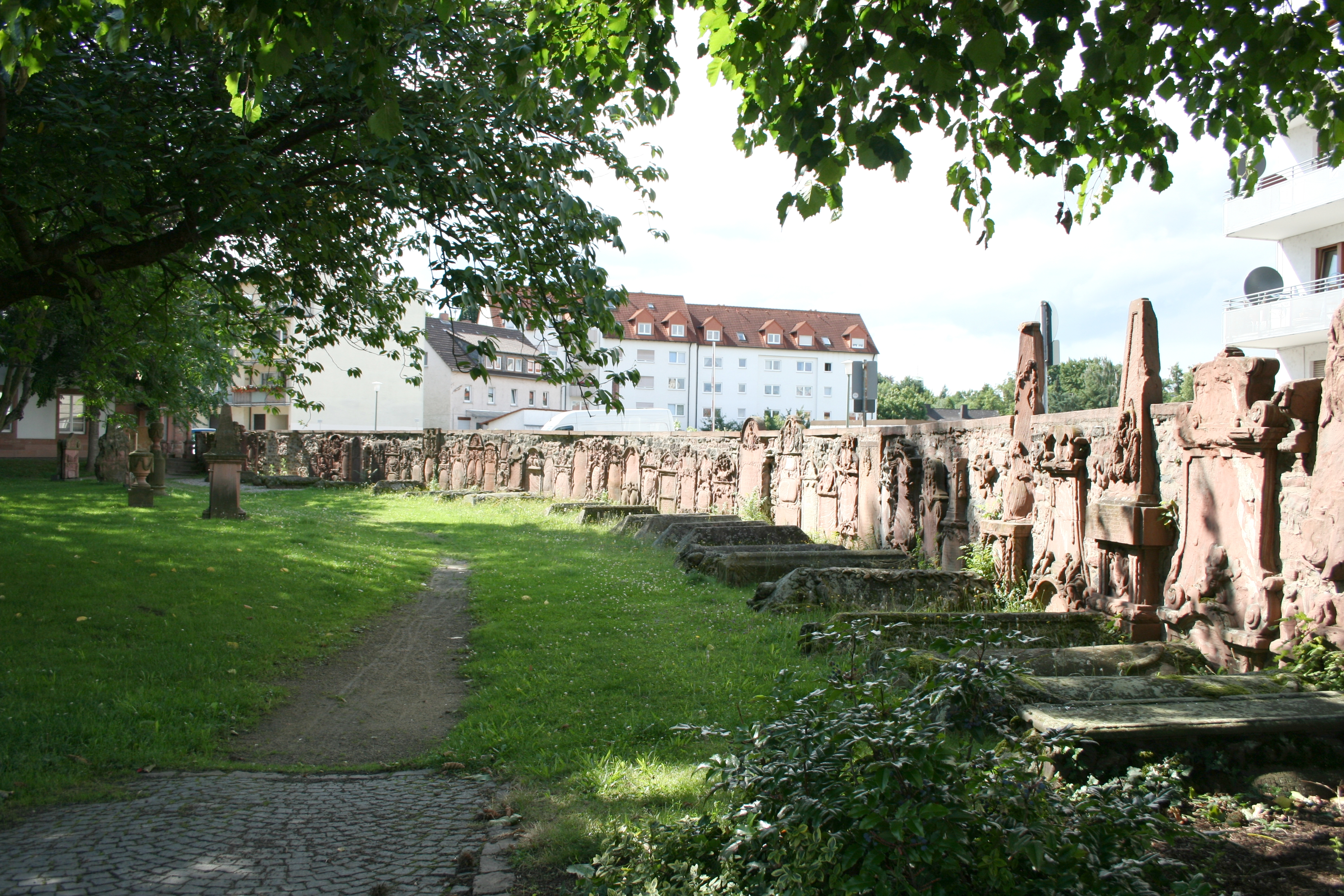 Alter Deutscher Friedhof in Hanau. Blick von Osten entlang der Mauer, in die zahlreiche Grabsteine eingesetzt wurden.